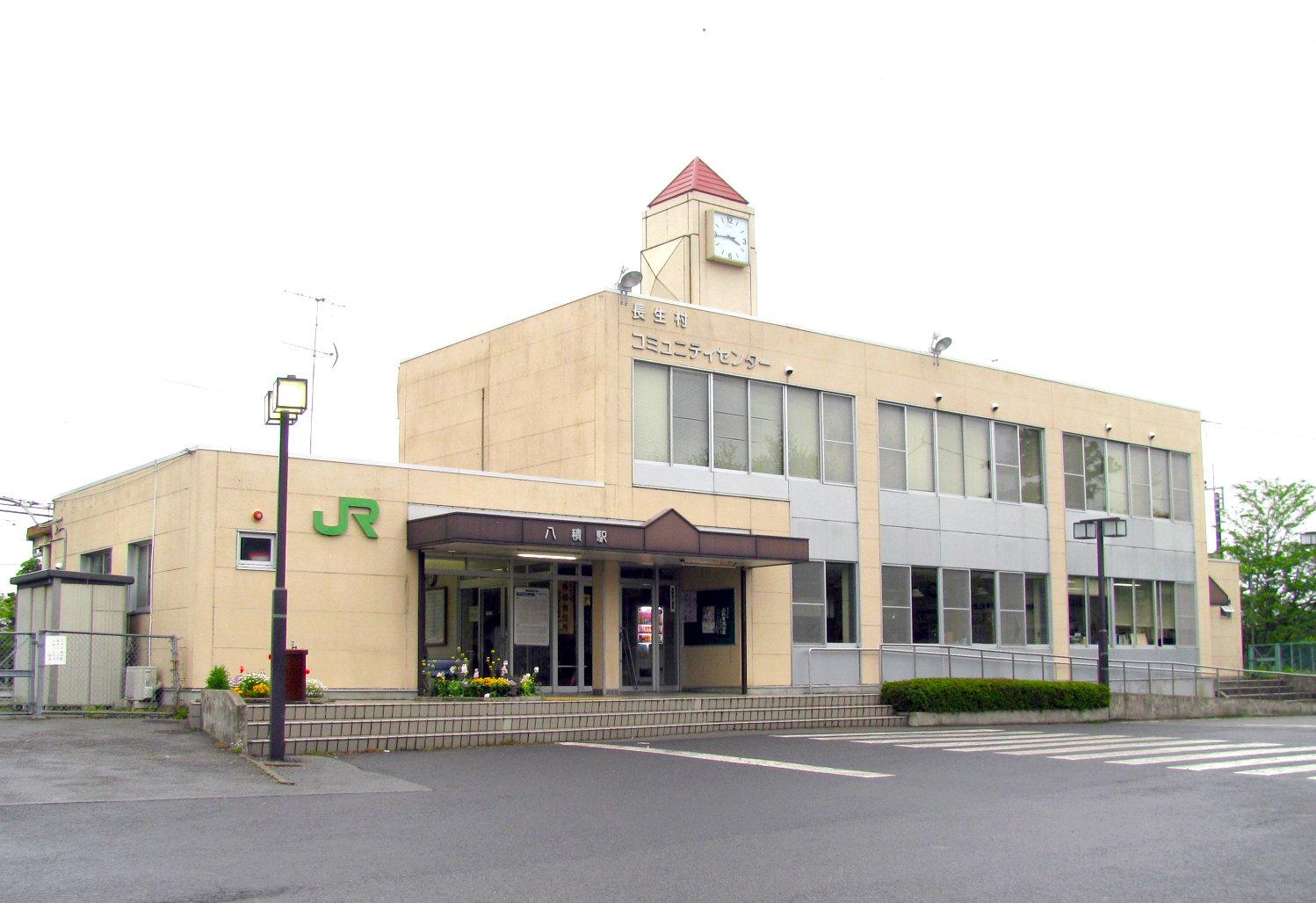 東日本旅客鉄道外房線八積駅